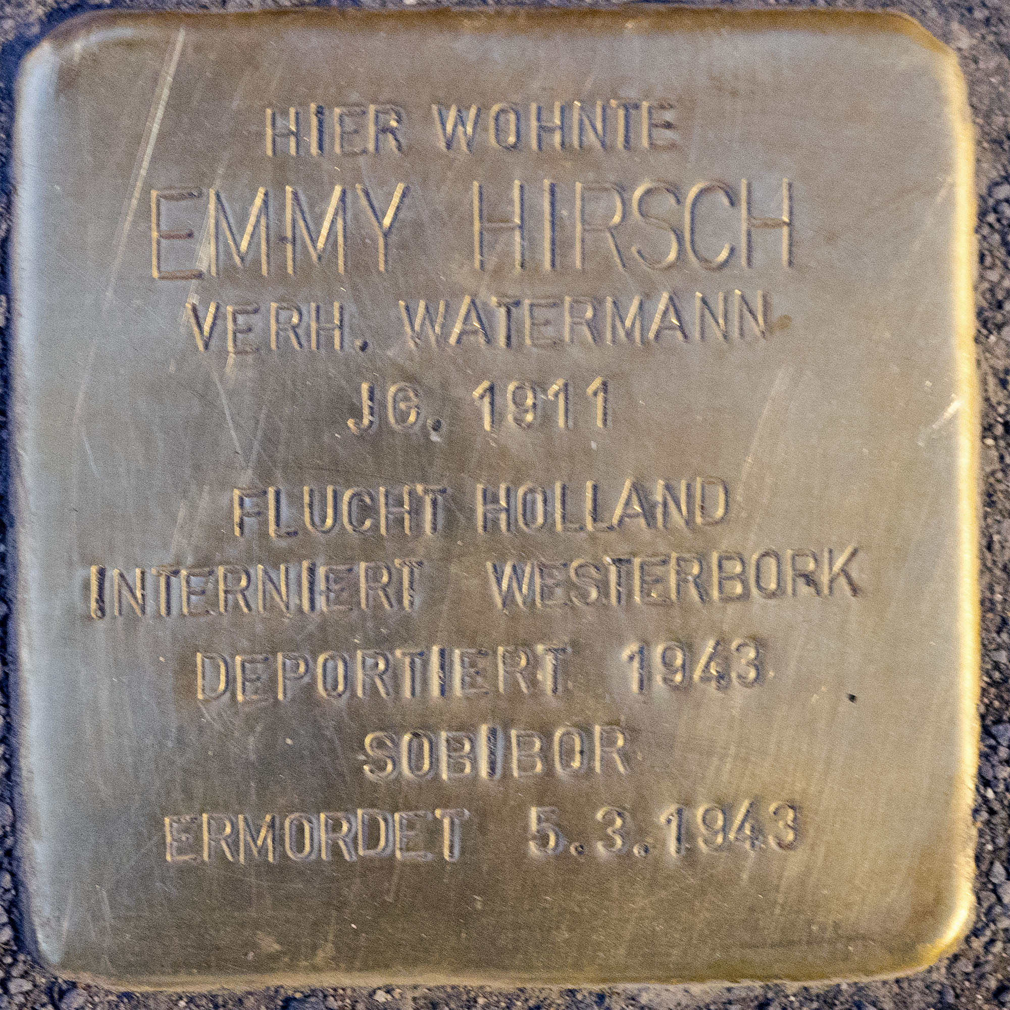 2016 11 25 Stolpersteine Kempen Hirsch Emmy